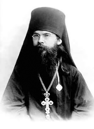 Архимандрит Вениамин (Казанский), ректор Самарской Духовной семинарии.